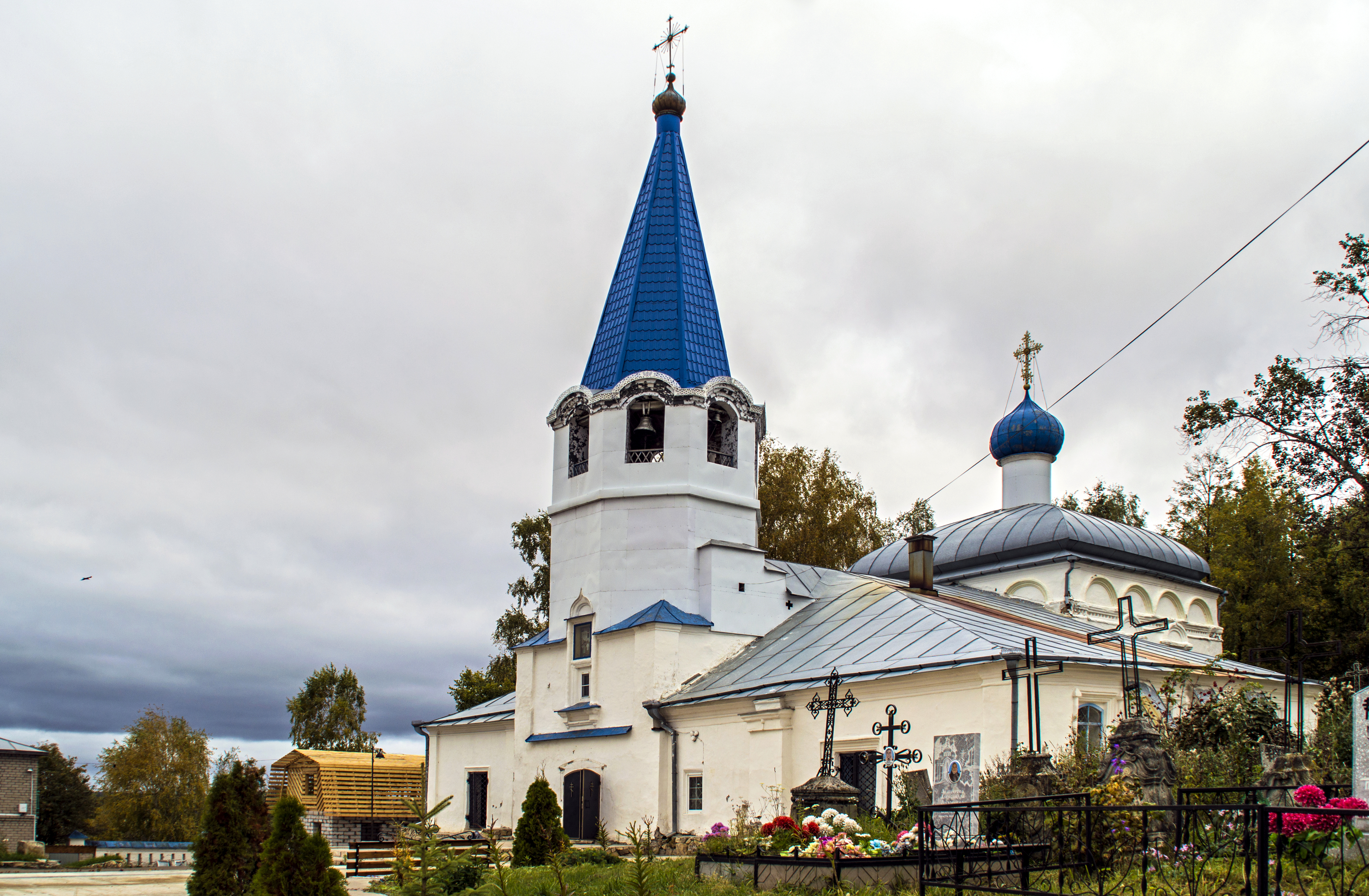 Церковь Покрова Пресвятой Богородицы: кладбище, Советск, Советский район, Кировская область